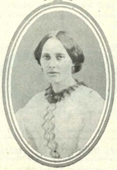 Amanda Kerfstedt i tidskriften Idun 1910.